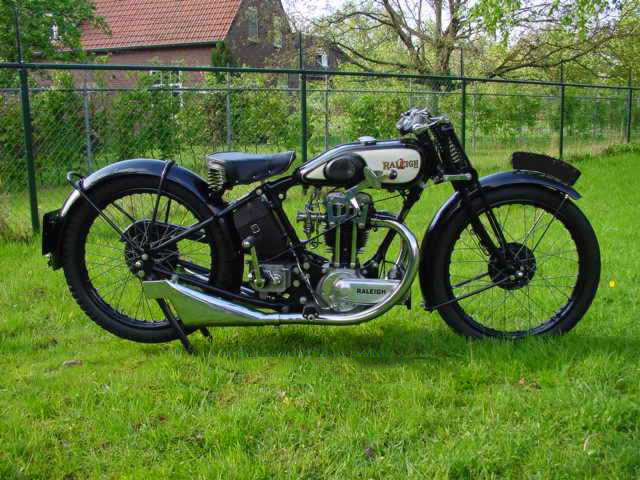 Raleigh 500 Sports 1928.